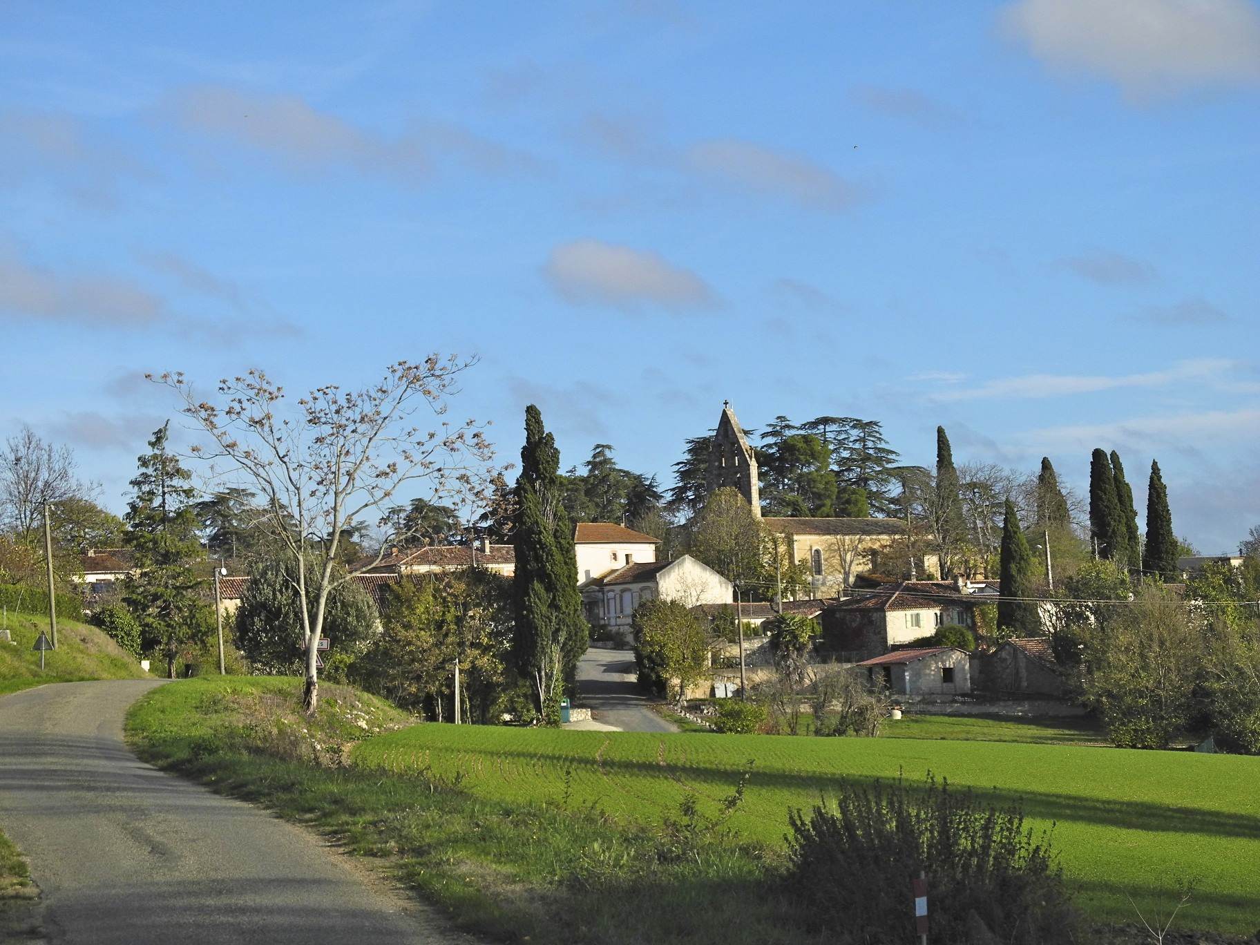 Vue du village de Bivès en novembre 2011